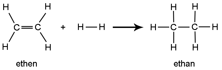 Additionsreaktion mellem ethen og et H-H molekyle